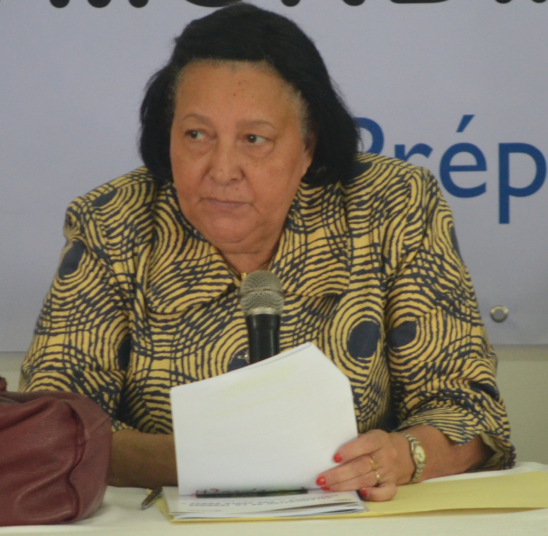 Professeur Mireille Dosso, Directrice de l'Institut Pasteur de Côte d'Ivoire (IPCI)